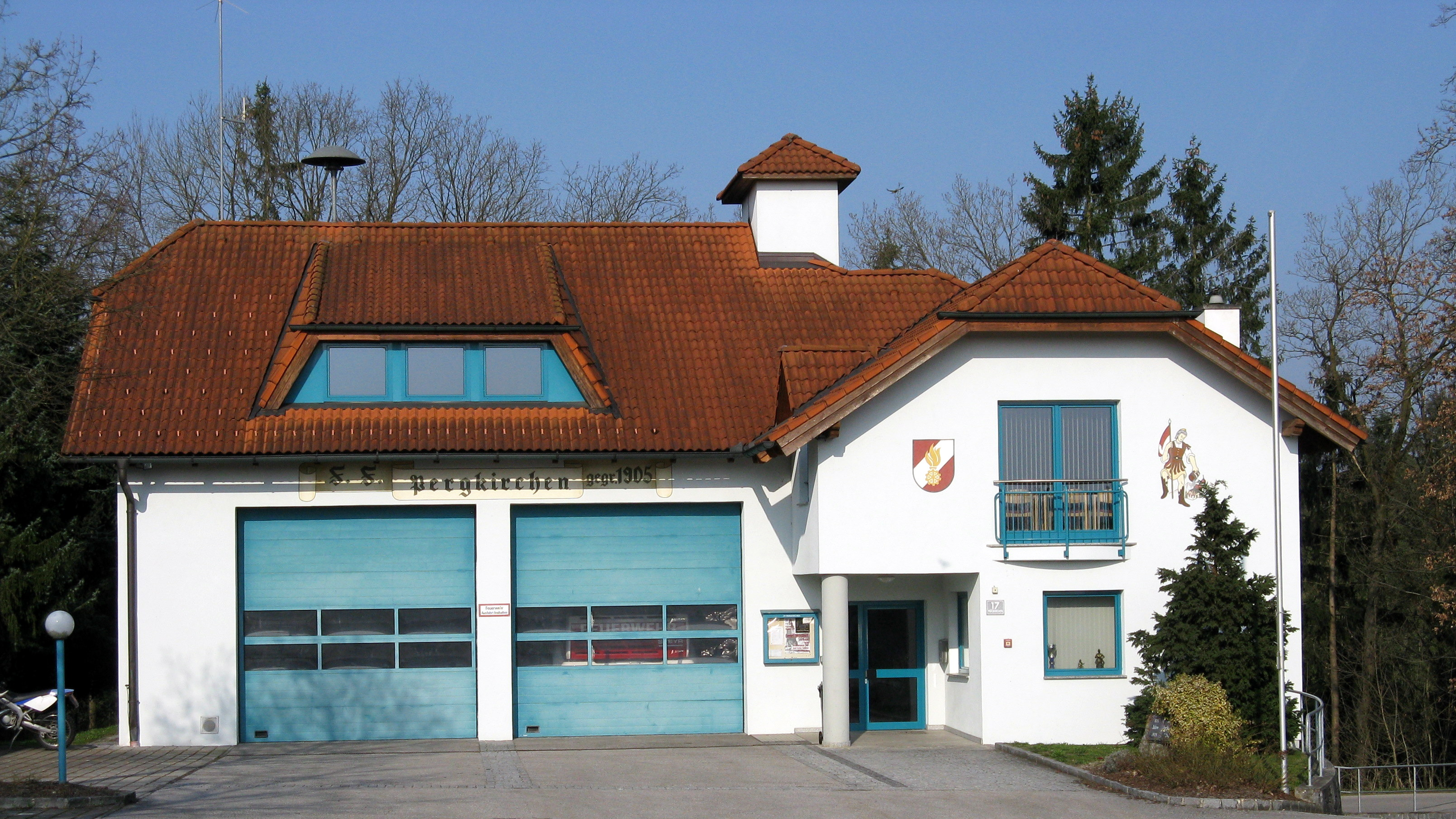 Feuerwehrzeughaus in Pergkirchen, Stadtgemeinde Perg